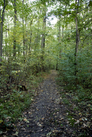 Habrová doubrava v PP Obroa v Uhříněvsi